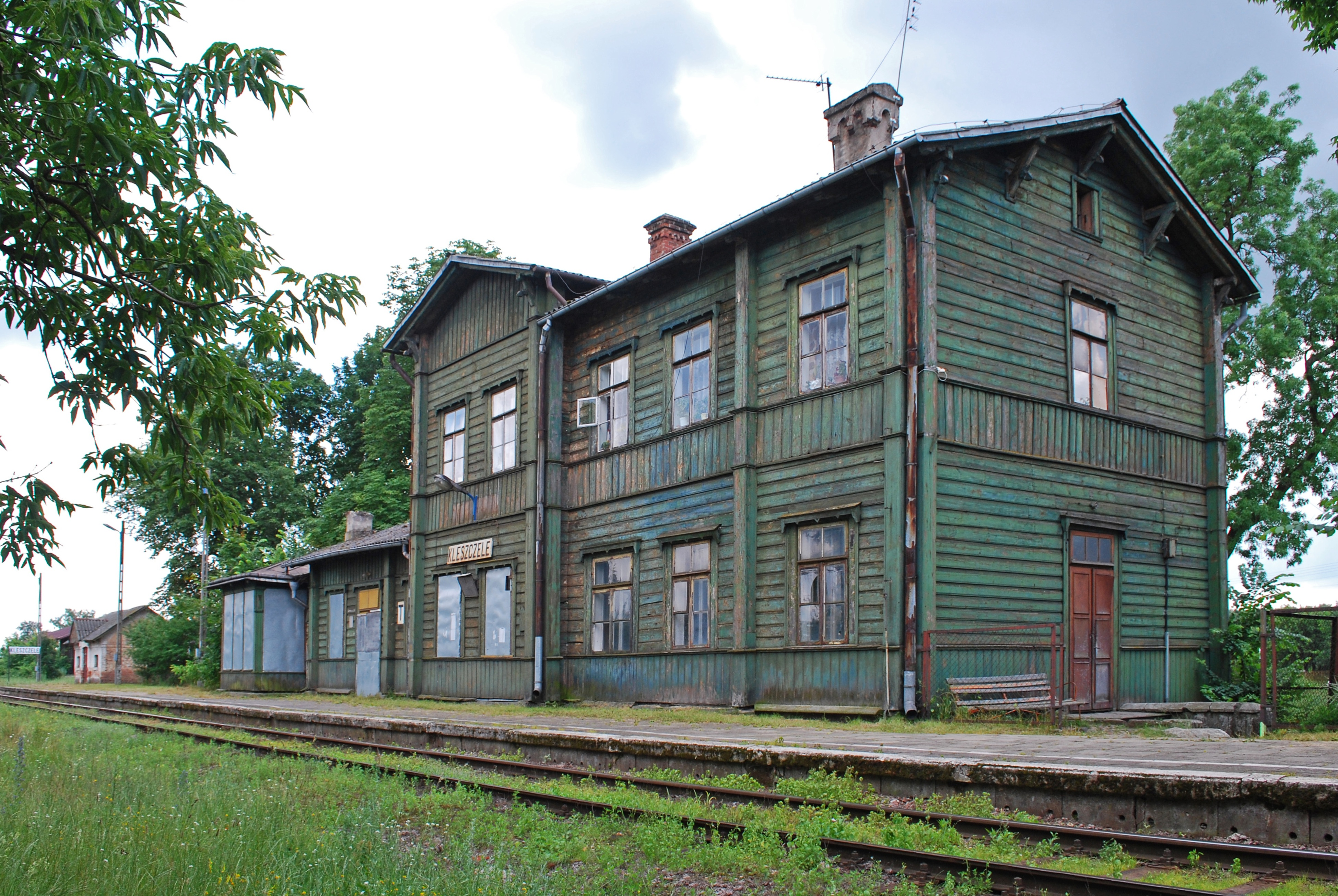 Stacja kolejowa w Kleszczelach. This photo from Podlaskie Voievodeship was taken during Polish Wikiexpedition 2009 set up by Wikimedia Polska Association. The making of this document was supported by Wikimedia Polska.